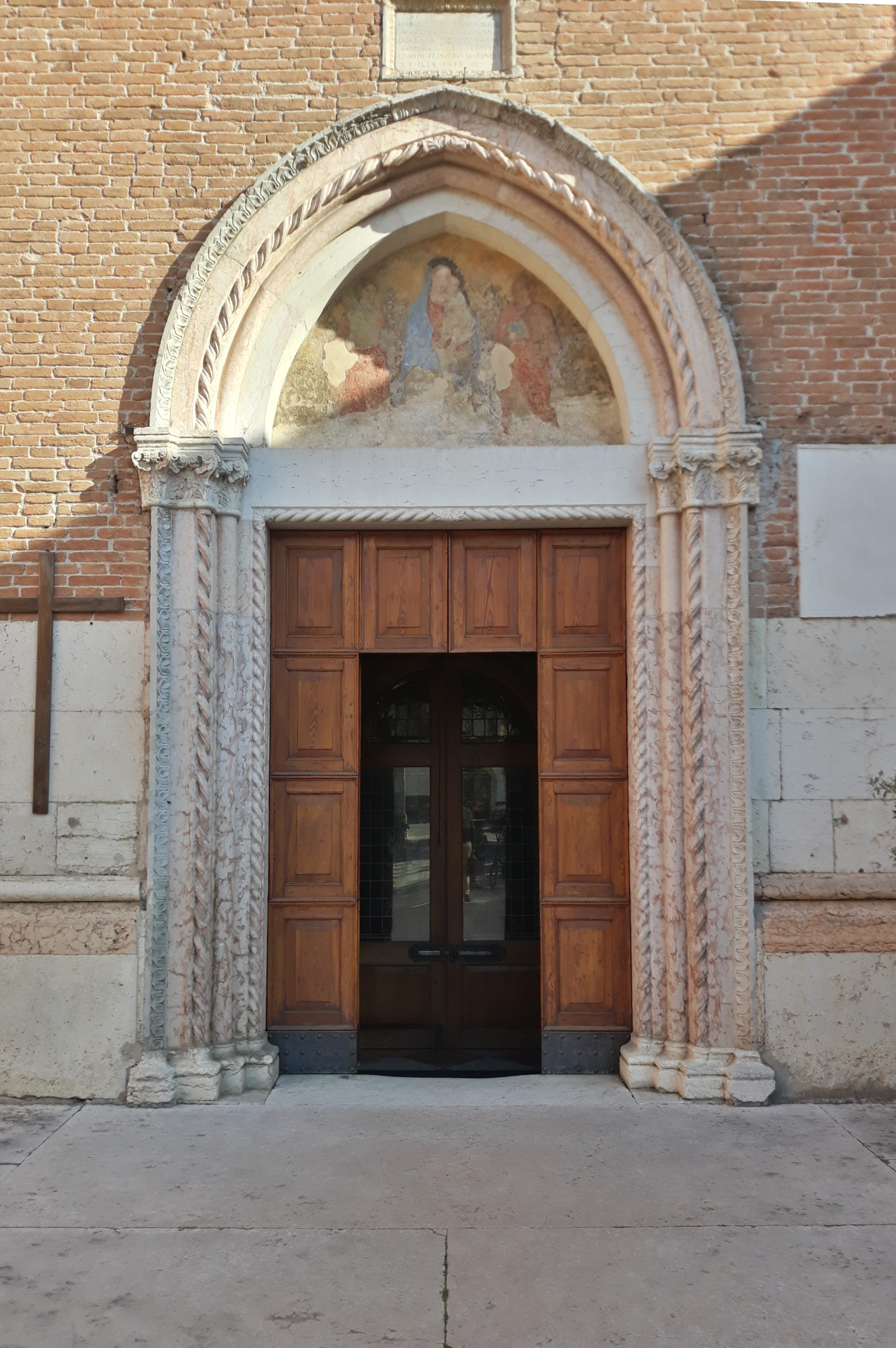 Portale di ingresso della chiesa di san Nazaro a Verona